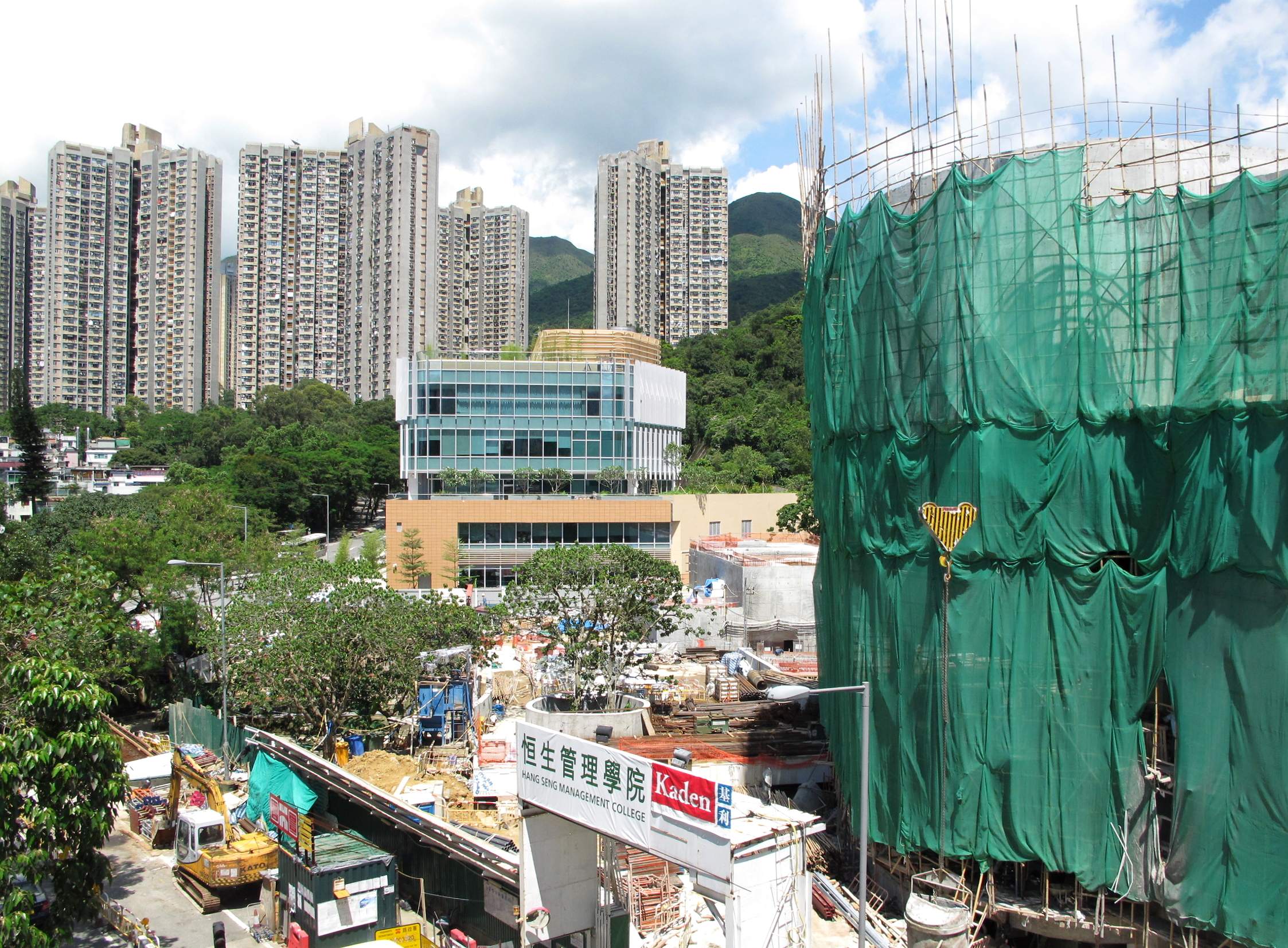 Hang Seng Management College